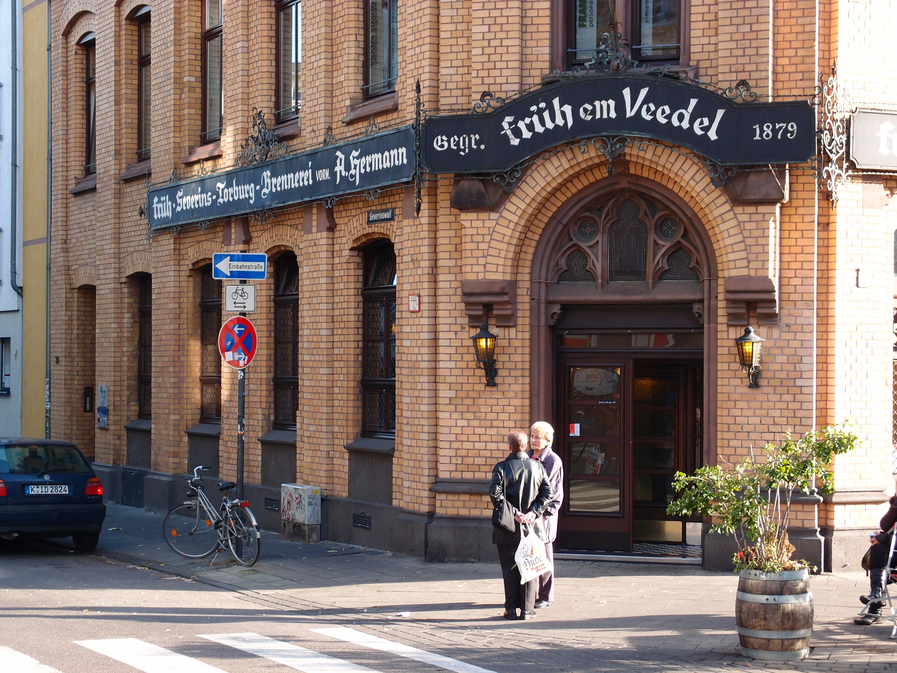 Brauhaus "Früh em Veedel" (in: Köln-Severinsviertel) Datum: 19.11.2011 Urheber: M. Pfeiffer alias Gordito1869 Quelle: Privates Fotoarchiv des Urheber